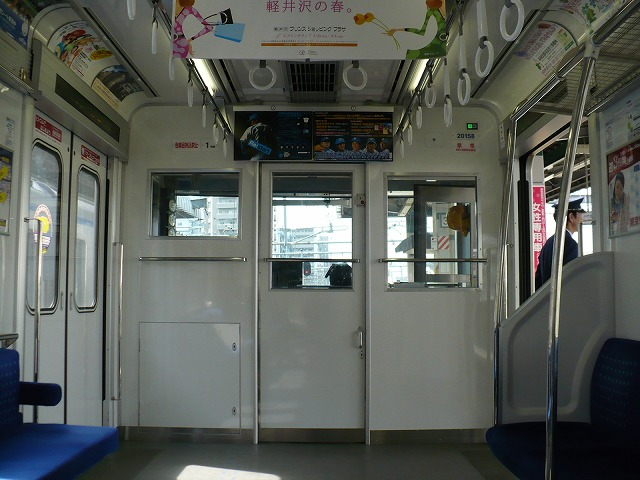 西武鉄道20000系の乗務員室背面仕切壁